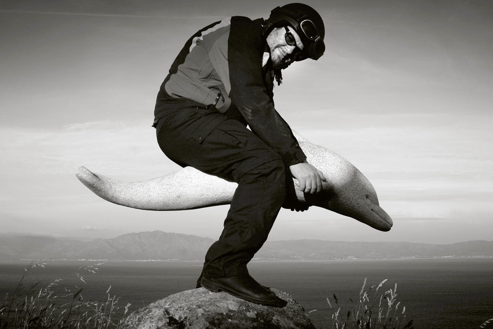 Vlaams acteur en zanger Wim Opbrouck